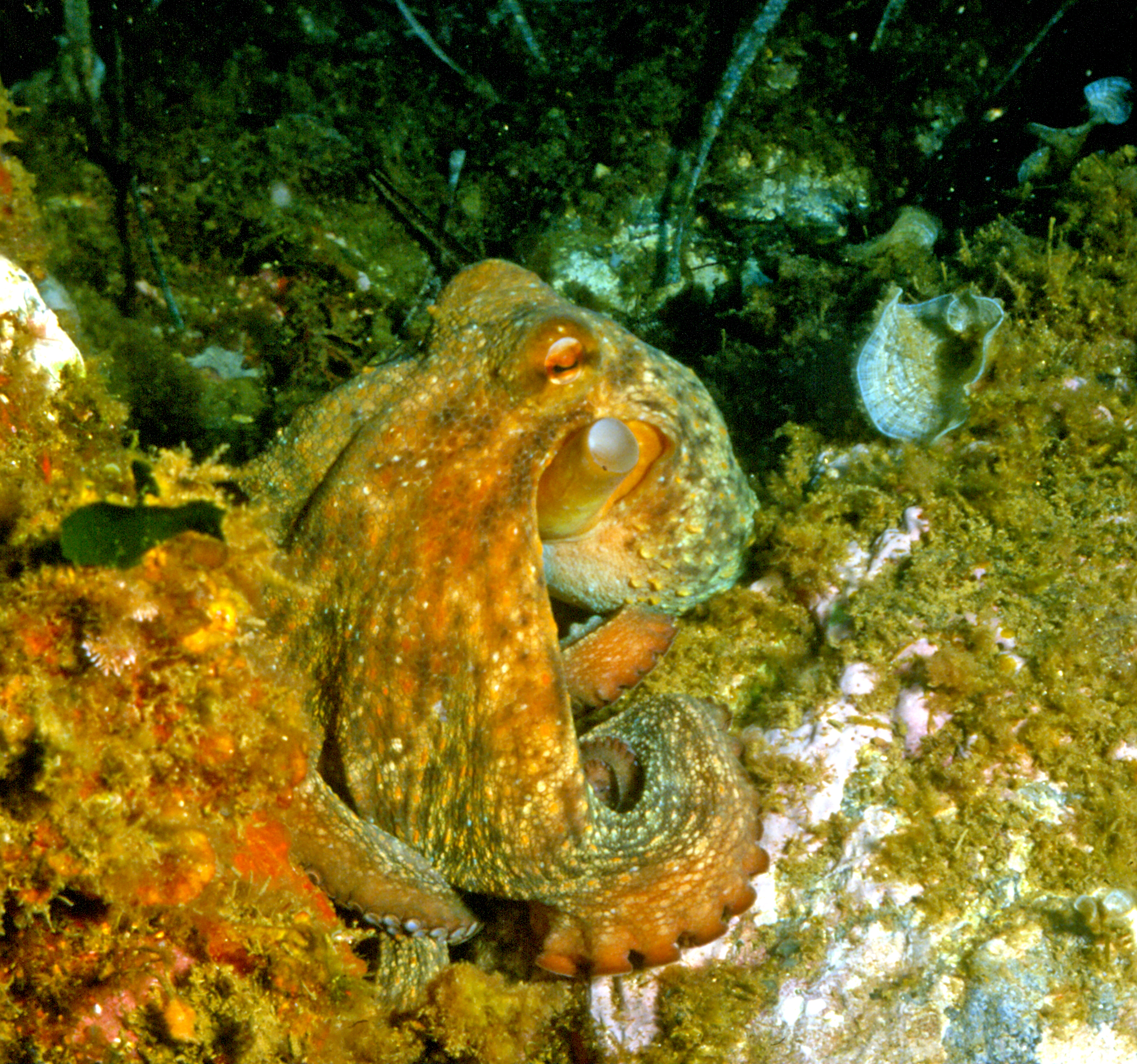 Octopus vulgaris. Le poulpe et la pieuvre sont le même animal, le poulpe n'est pas le mâle et la pieuvre la femelle - Banyuls-sur-Mer : 09/81